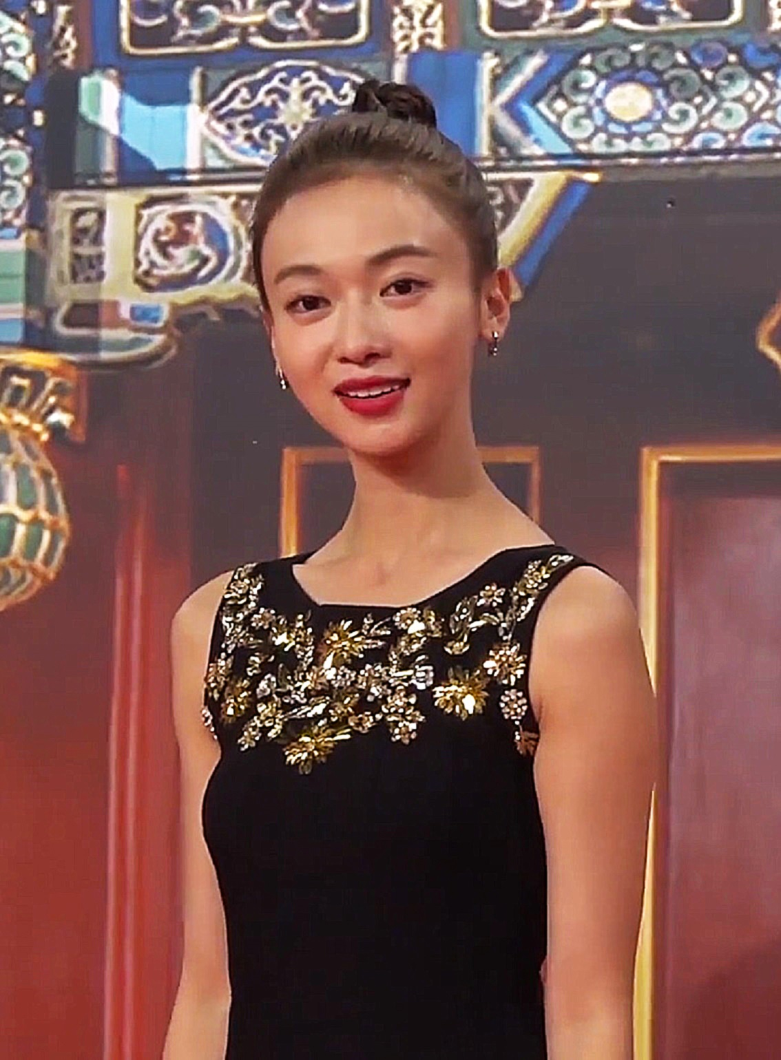 中文（香港）: 出身於北京電影學院，2018年因參演古裝劇集《延禧攻略》而受到注目